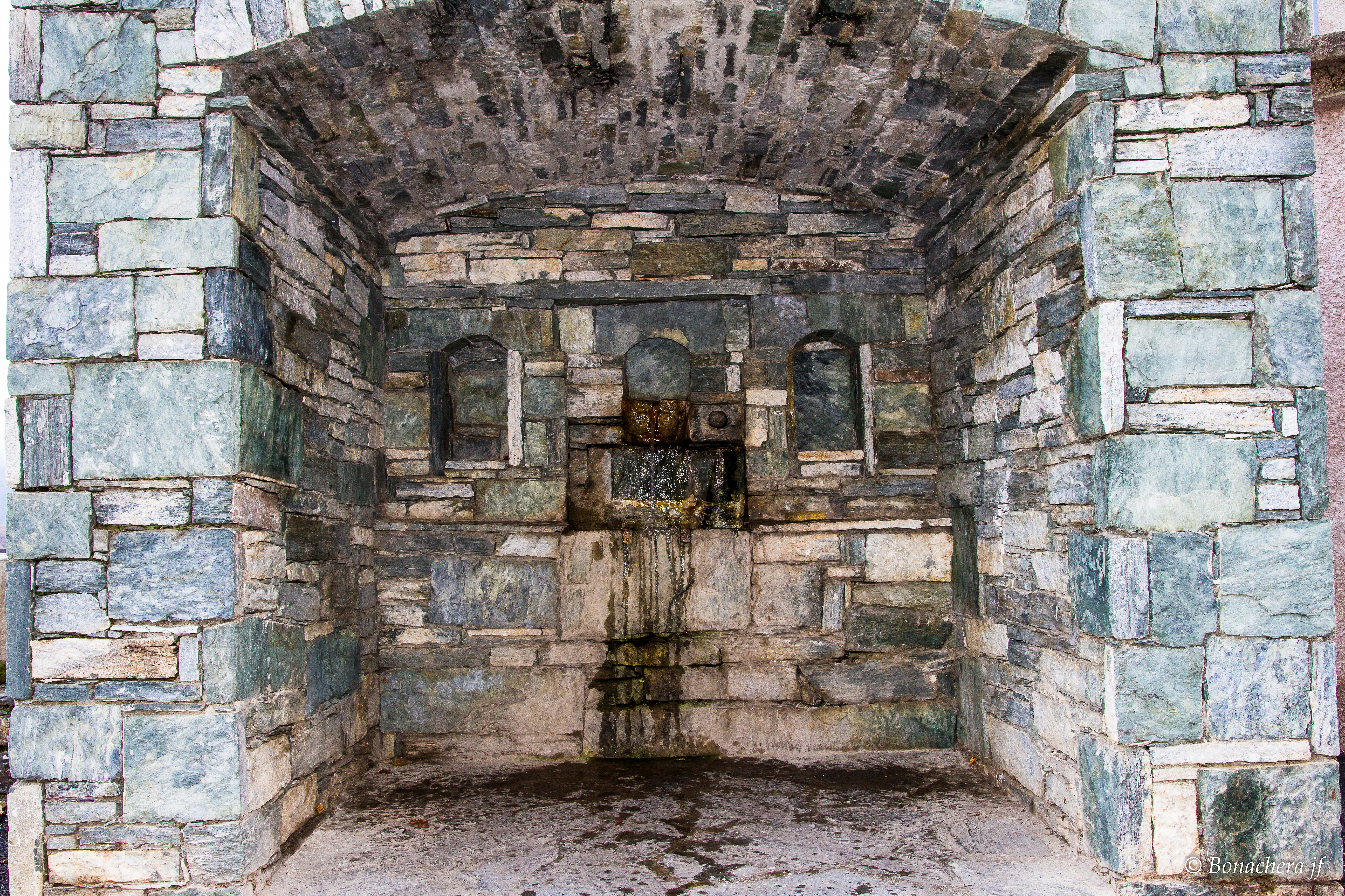 Verdèse, Castagniccia (Haute-Corse) - La fontaine à Petra zuccata